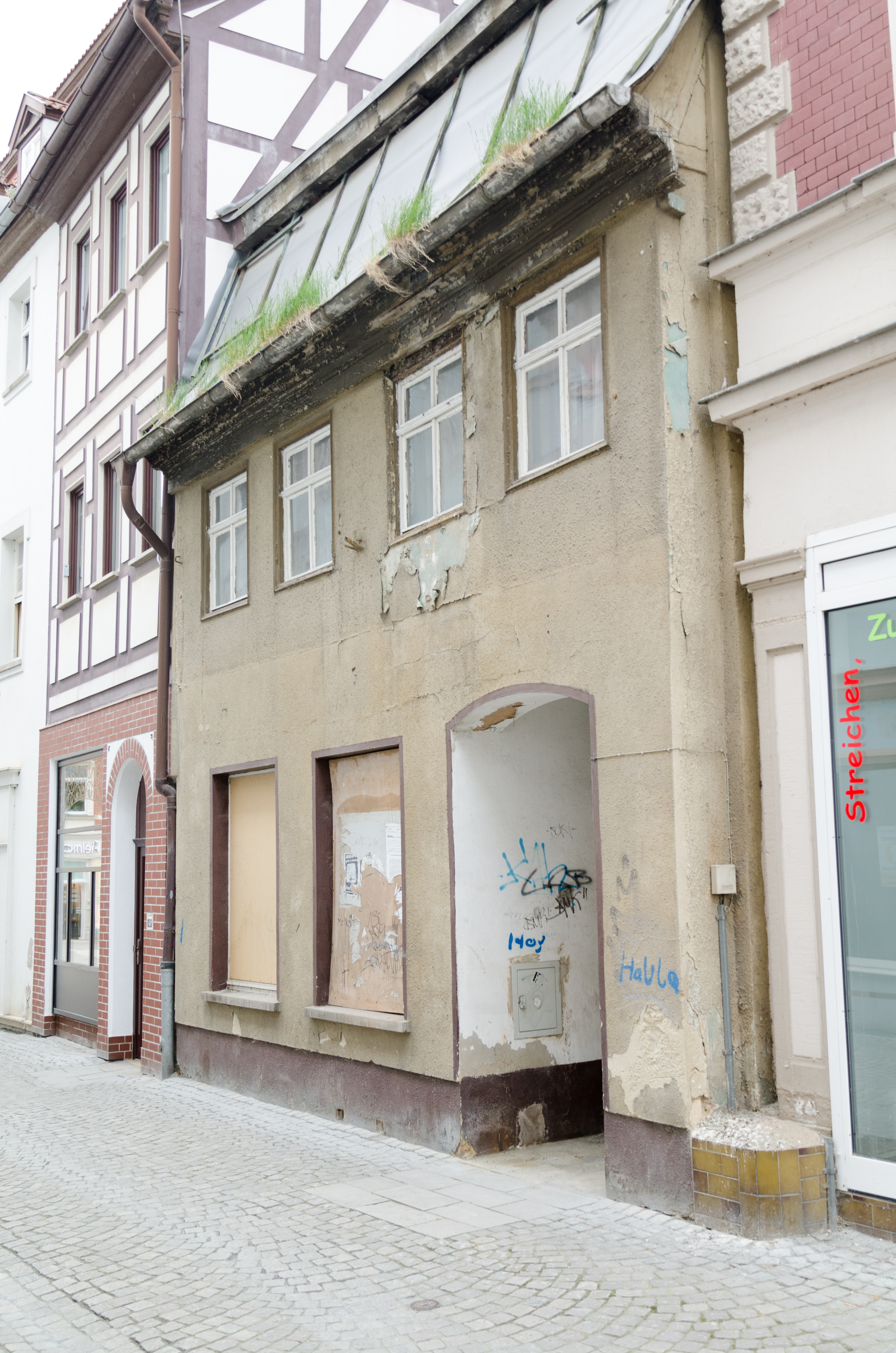 Zeitz, Kramerstraße 23